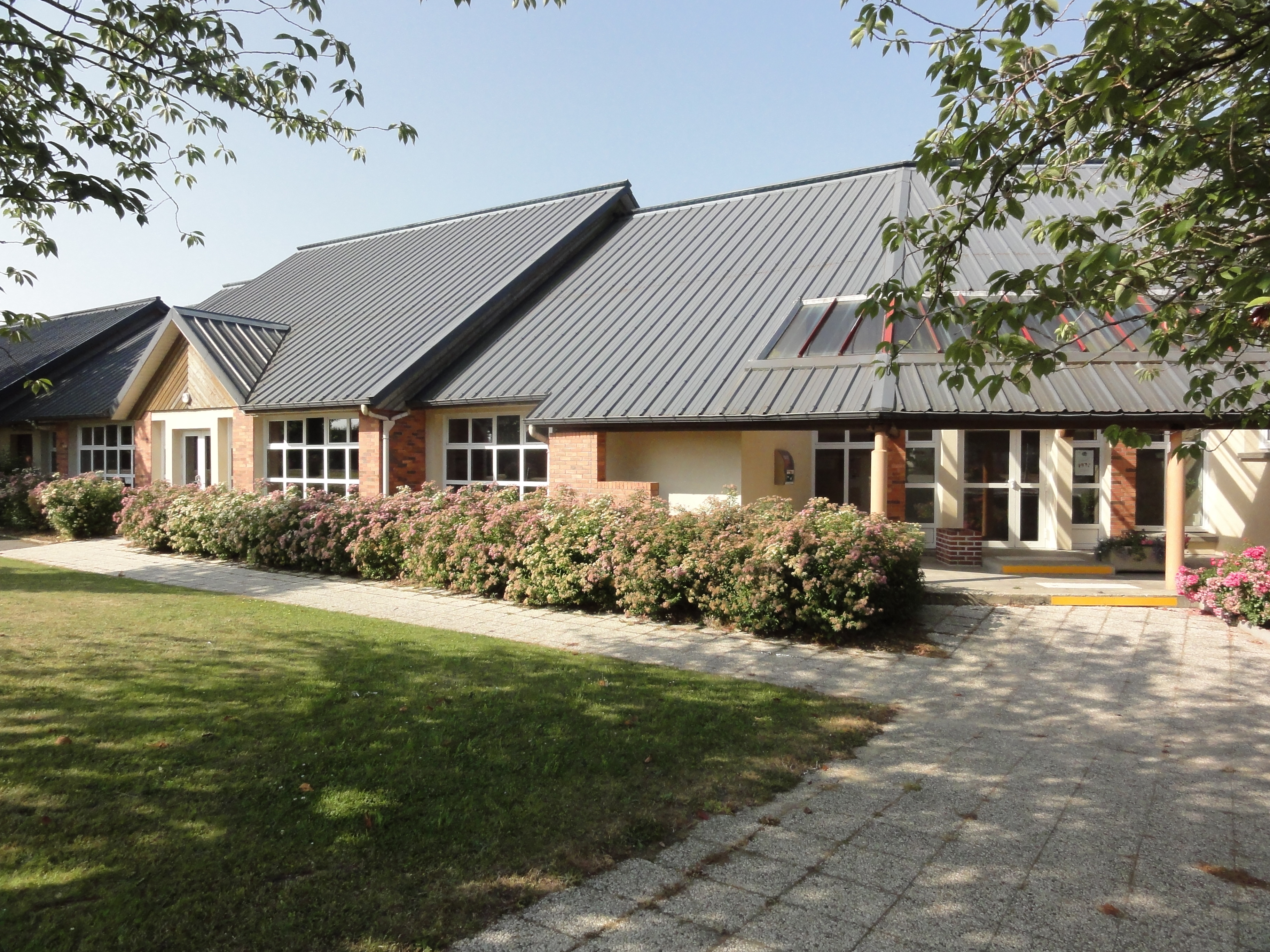 Nointot (Seine-Mar.) salle polyvalente